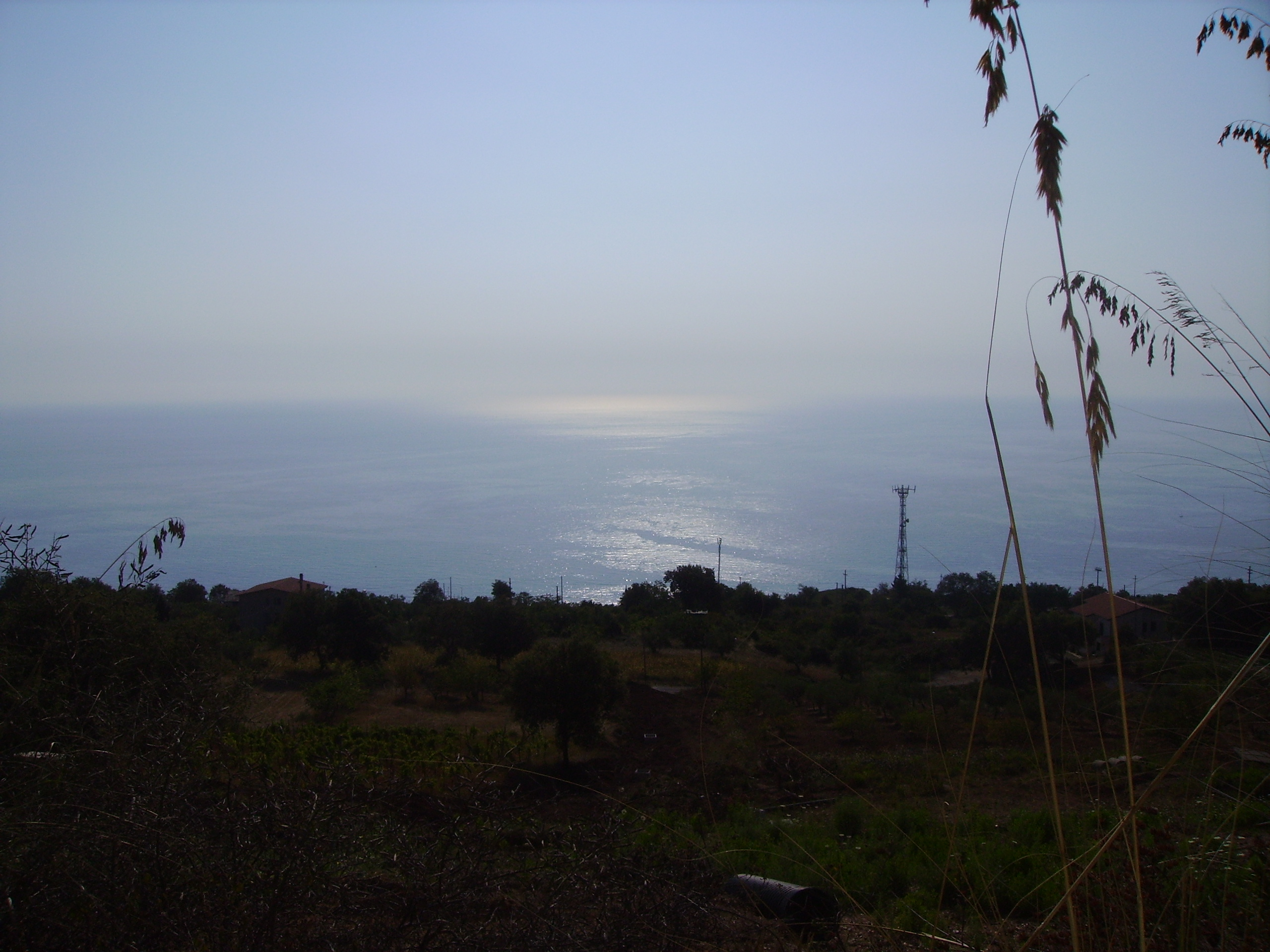 Mare al tramonto davanti belmonte